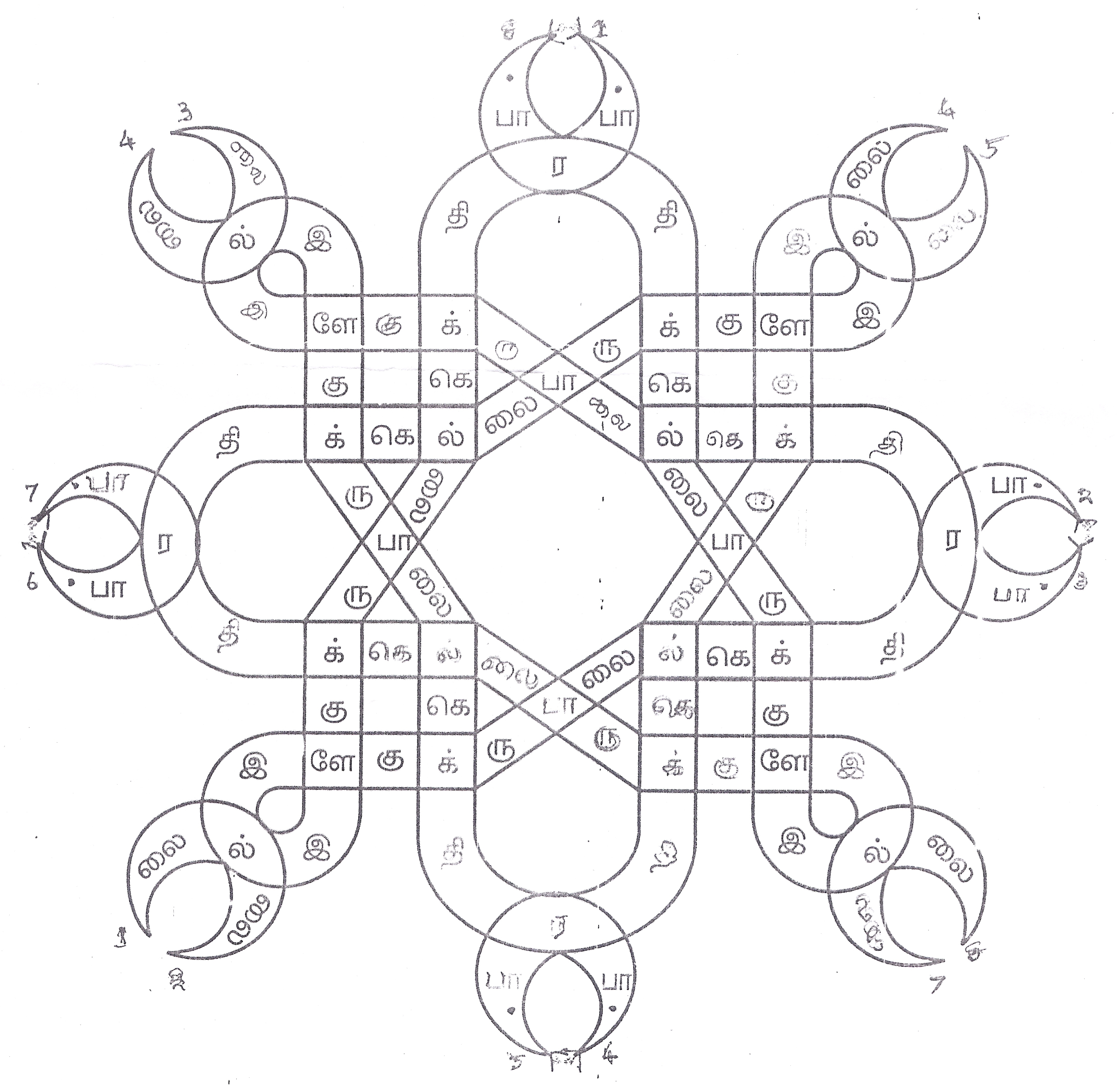 Tamil poem in drawing, சித்திரக் கவி. அட்ட நாக பந்தம், தமிழழகன் பாடலும் படமும், பொதுவுடைமை ஆக்கப்பட்டது. அவரது வேண்டுகோளின்படி இது பதிவேற்றப்படுகிறது.